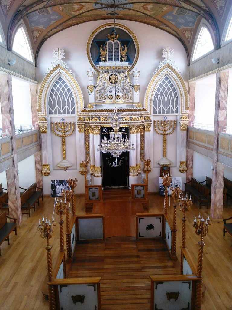 Sinagoga Historica de Justo Sierra 71